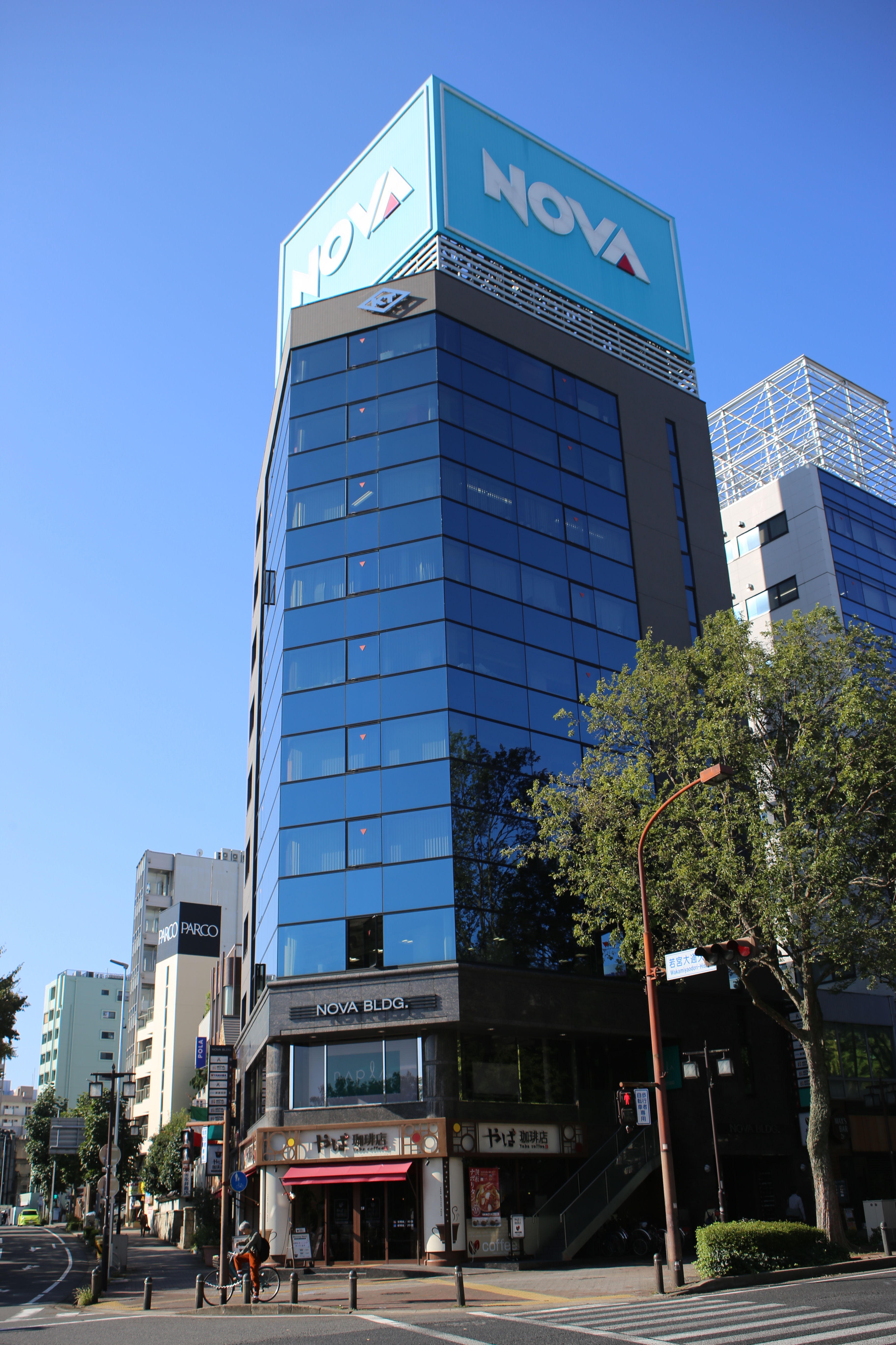 名古屋市中区大須四丁目のNOVAビル